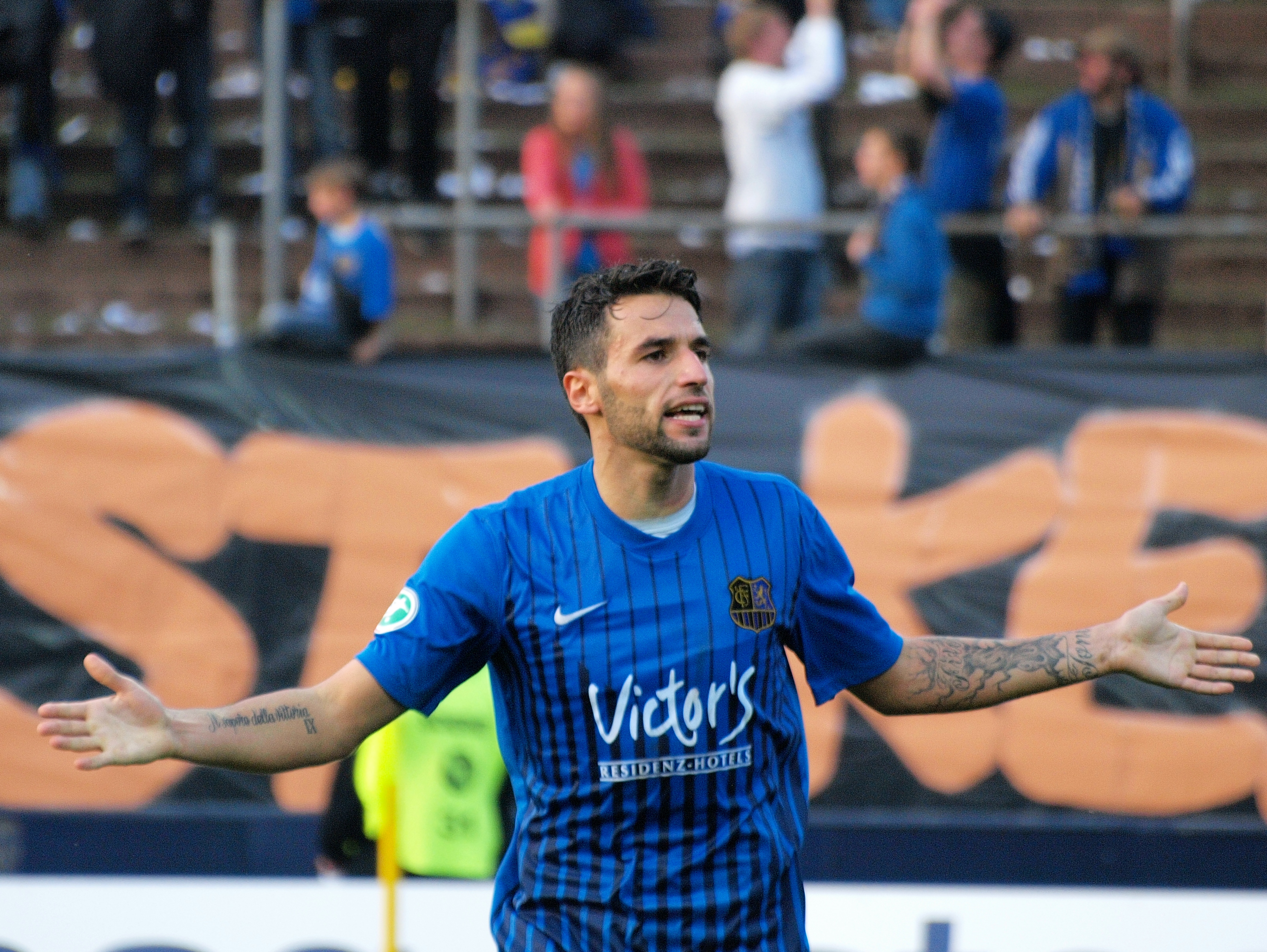 Giuseppe Pisano bejubelt ein Tor im Spiel 1.FC Saarbrücken - Preußen Münster